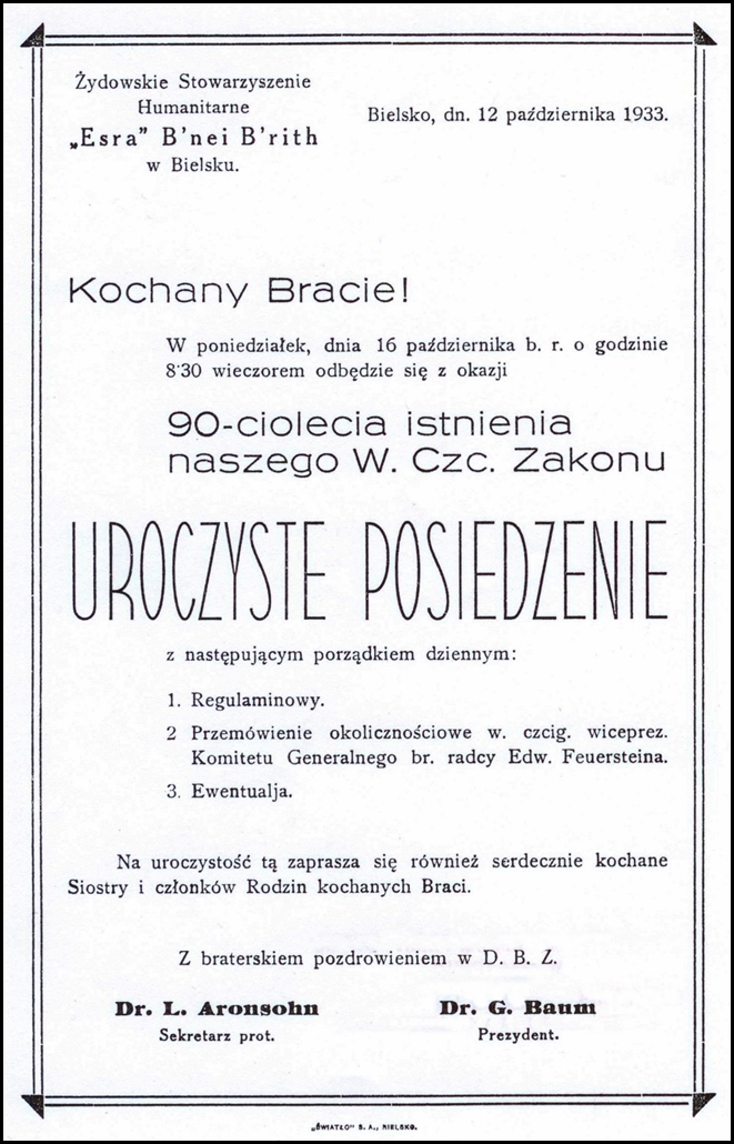 Zaproszenie na spotkanie B'nai B'rith Bielsko